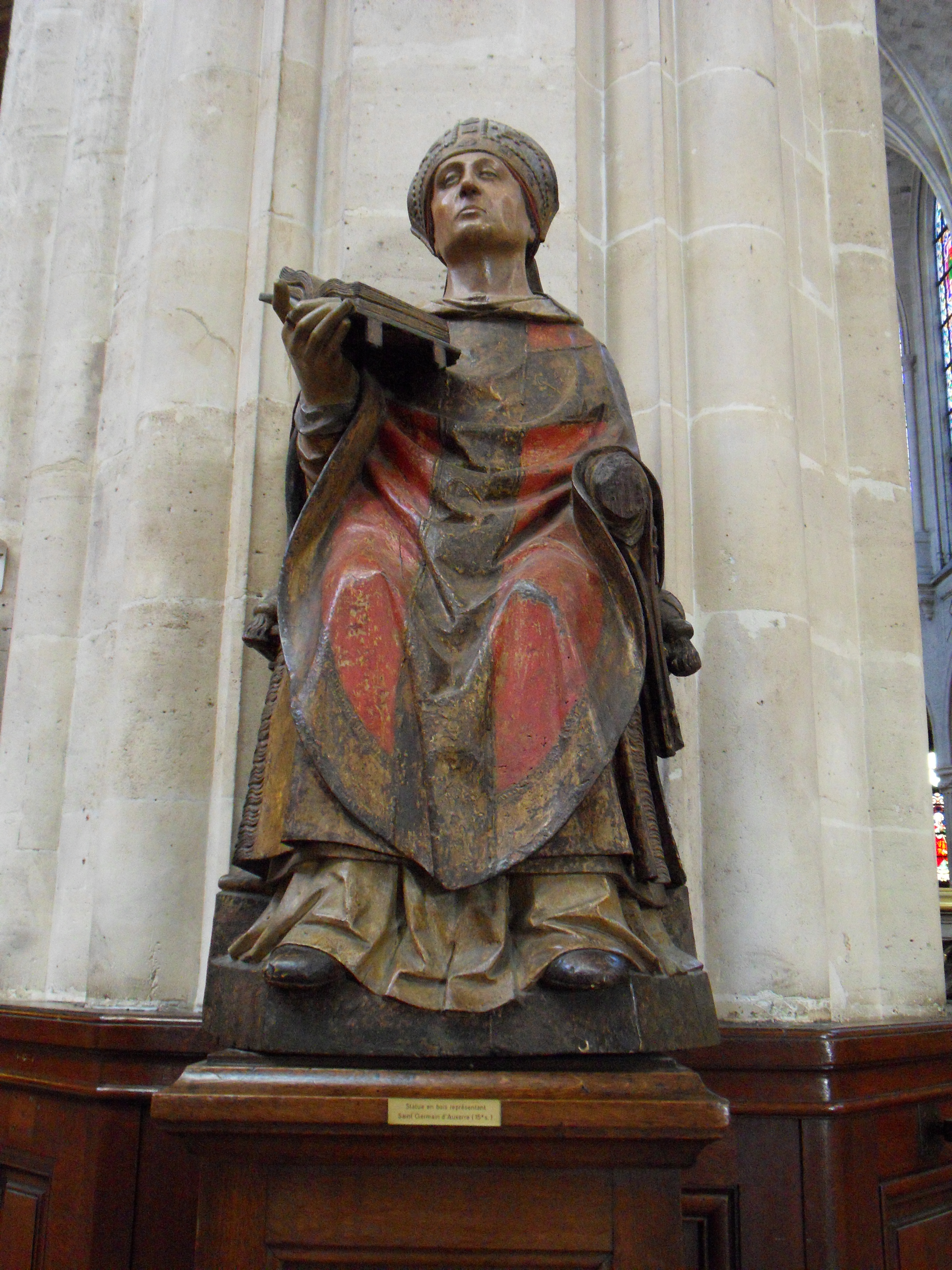 Sculpture en bois polychrome représentant saint Germain l'Auxerrois datée du XVe siècle, conservée dans l'église Saint-Germain-L'Auxerrois à Paris.